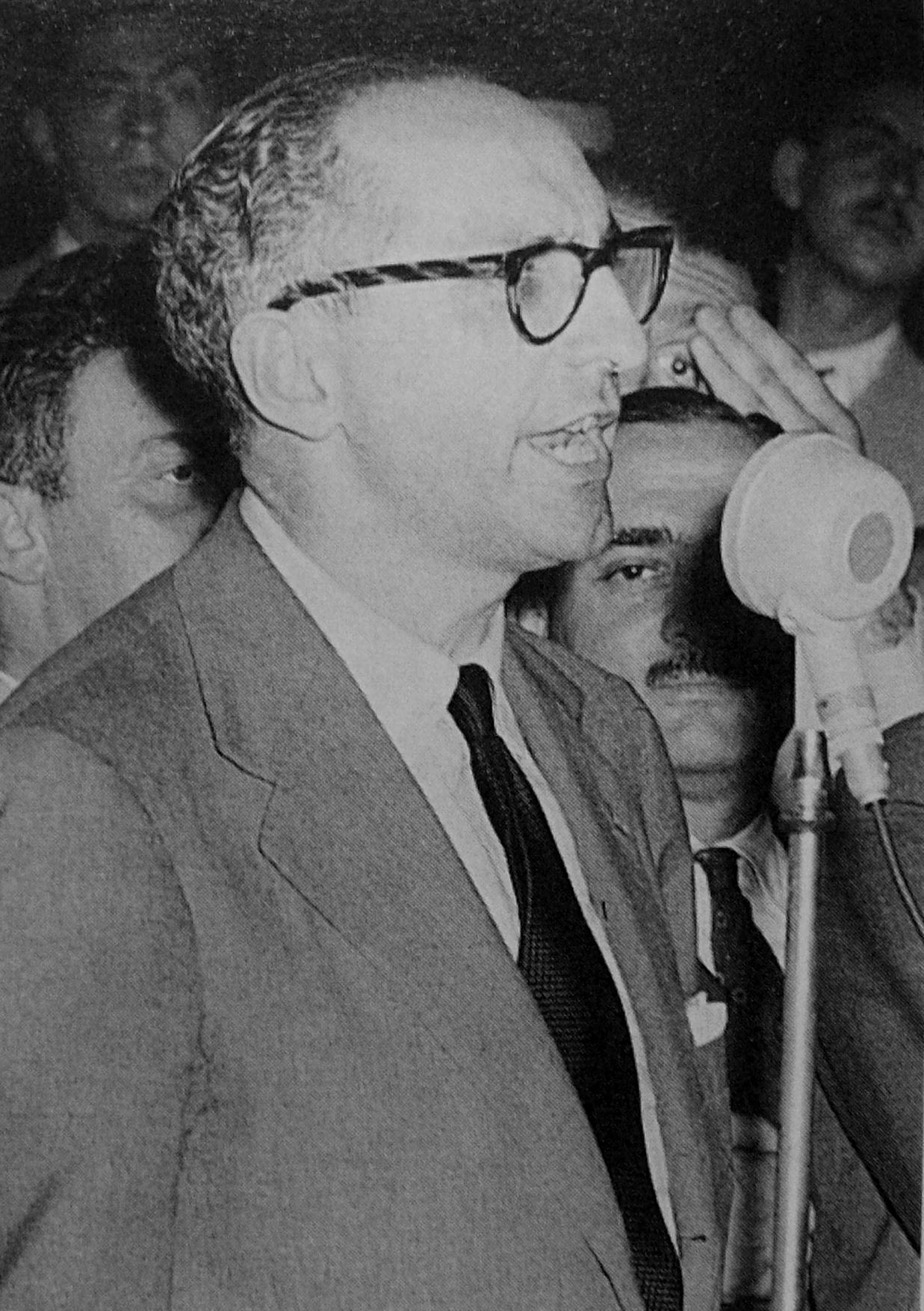 Es una foto de político Arturo Frondizi relatando un discurso a la gente (antes de ser presidente).